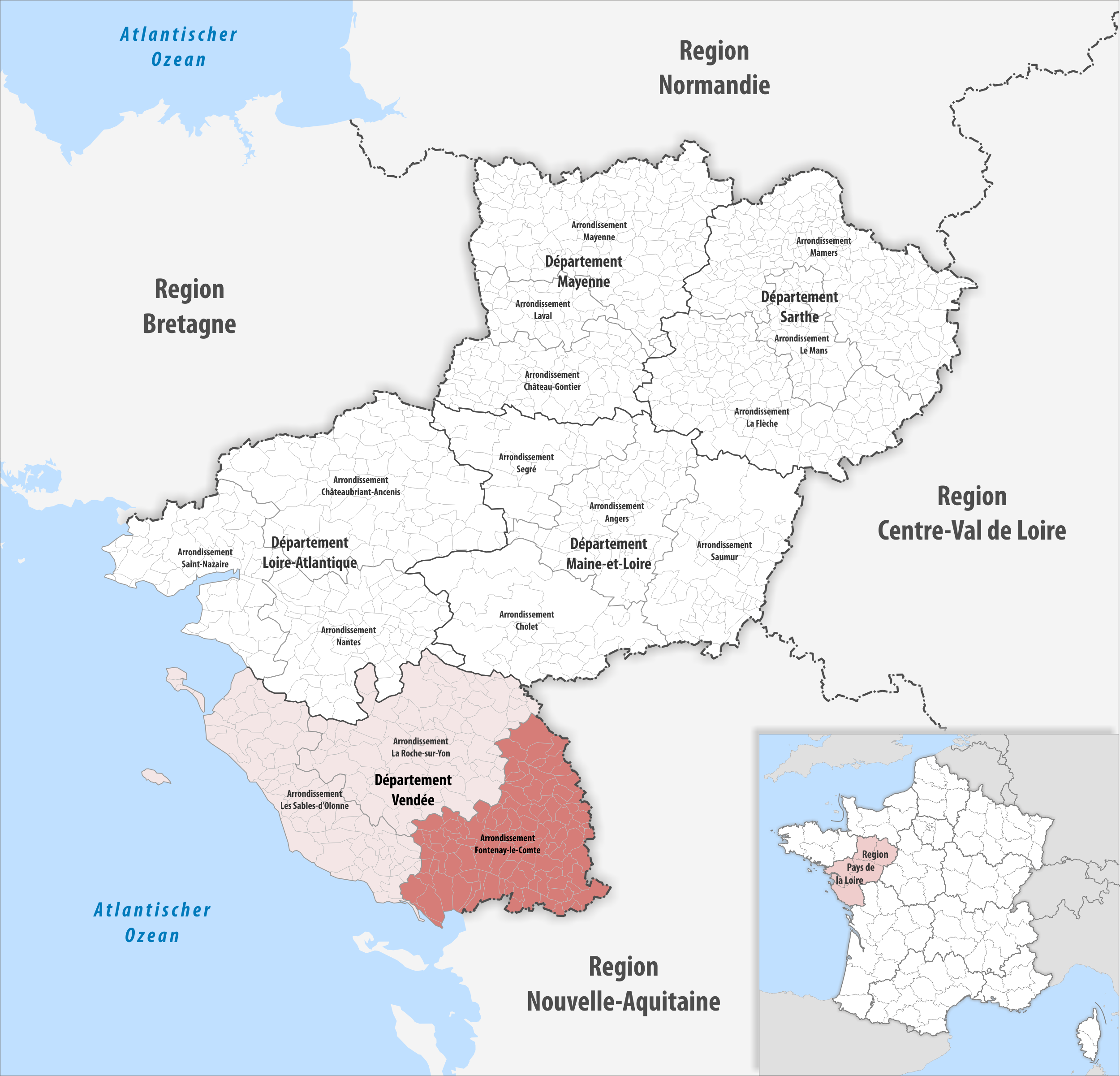 Lage des Arrondissements Fontenay-le-Comte